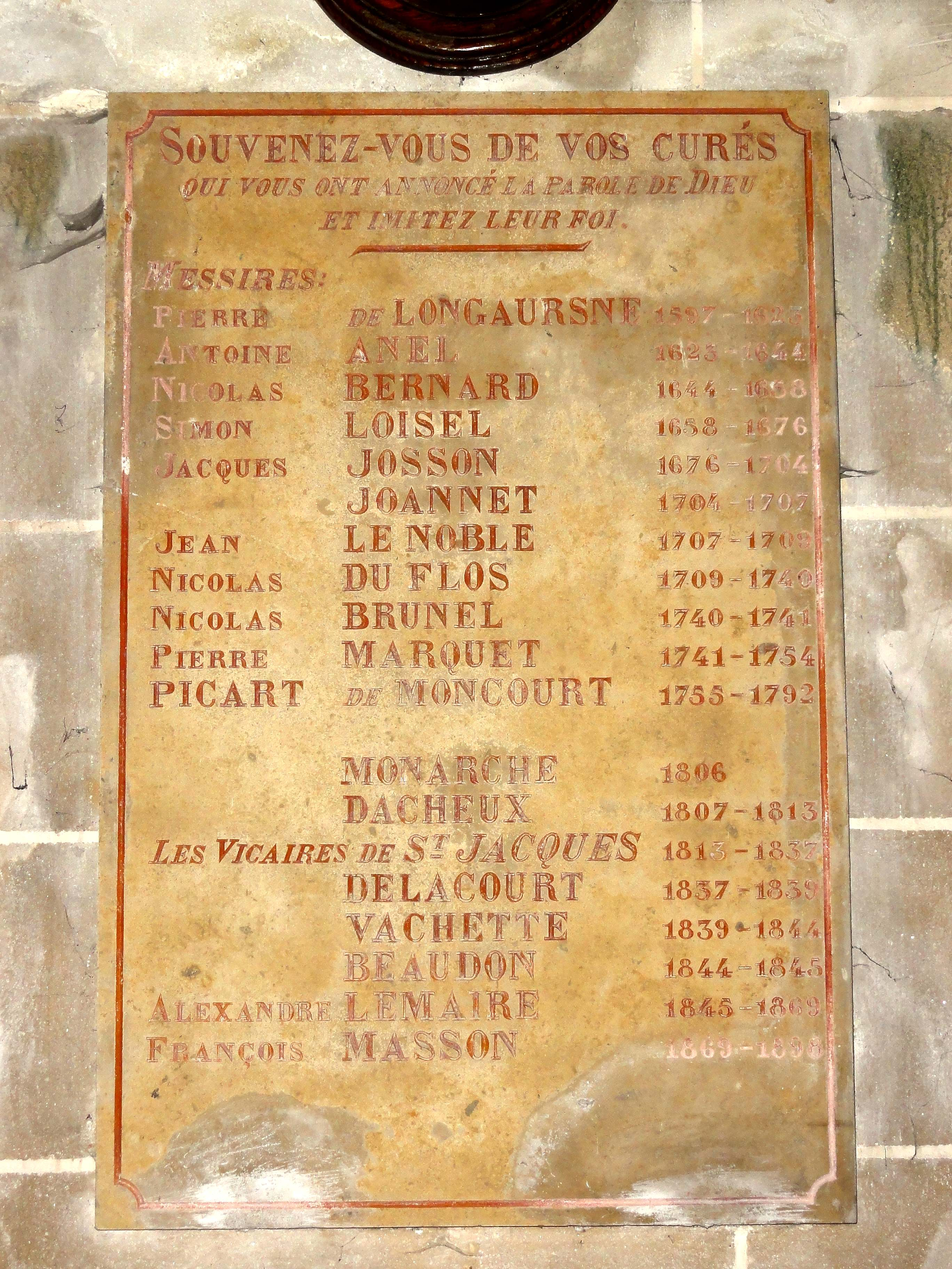 Mobilier de l'église (voir titre).